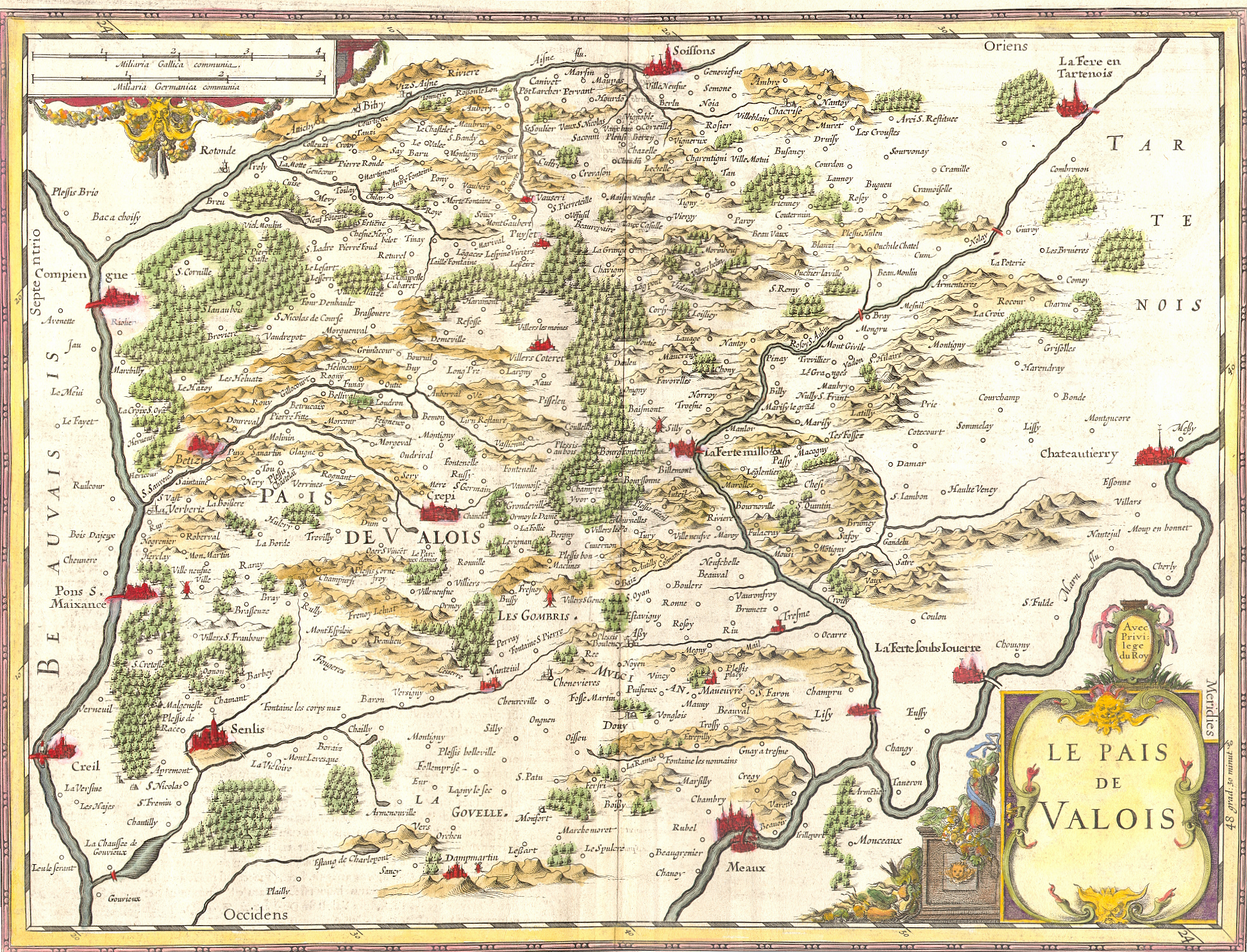 Carte du pays de Valois, France. Gravure sur métal.